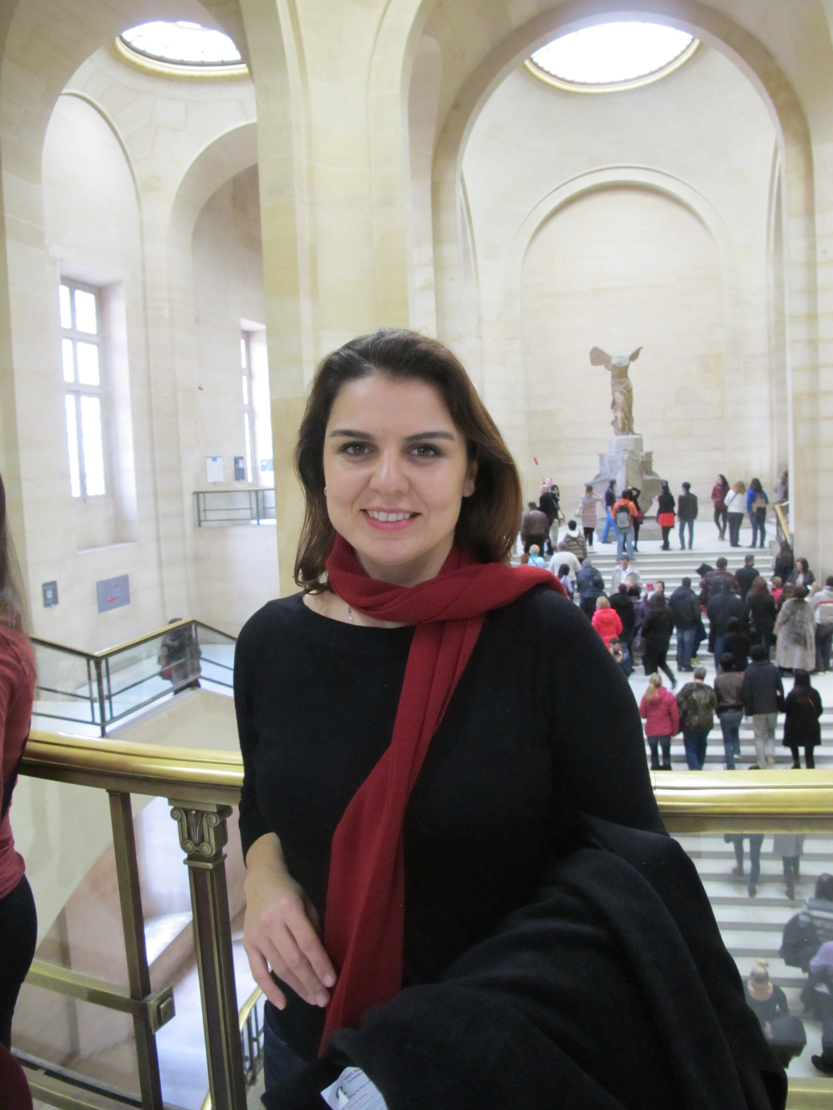 Paris